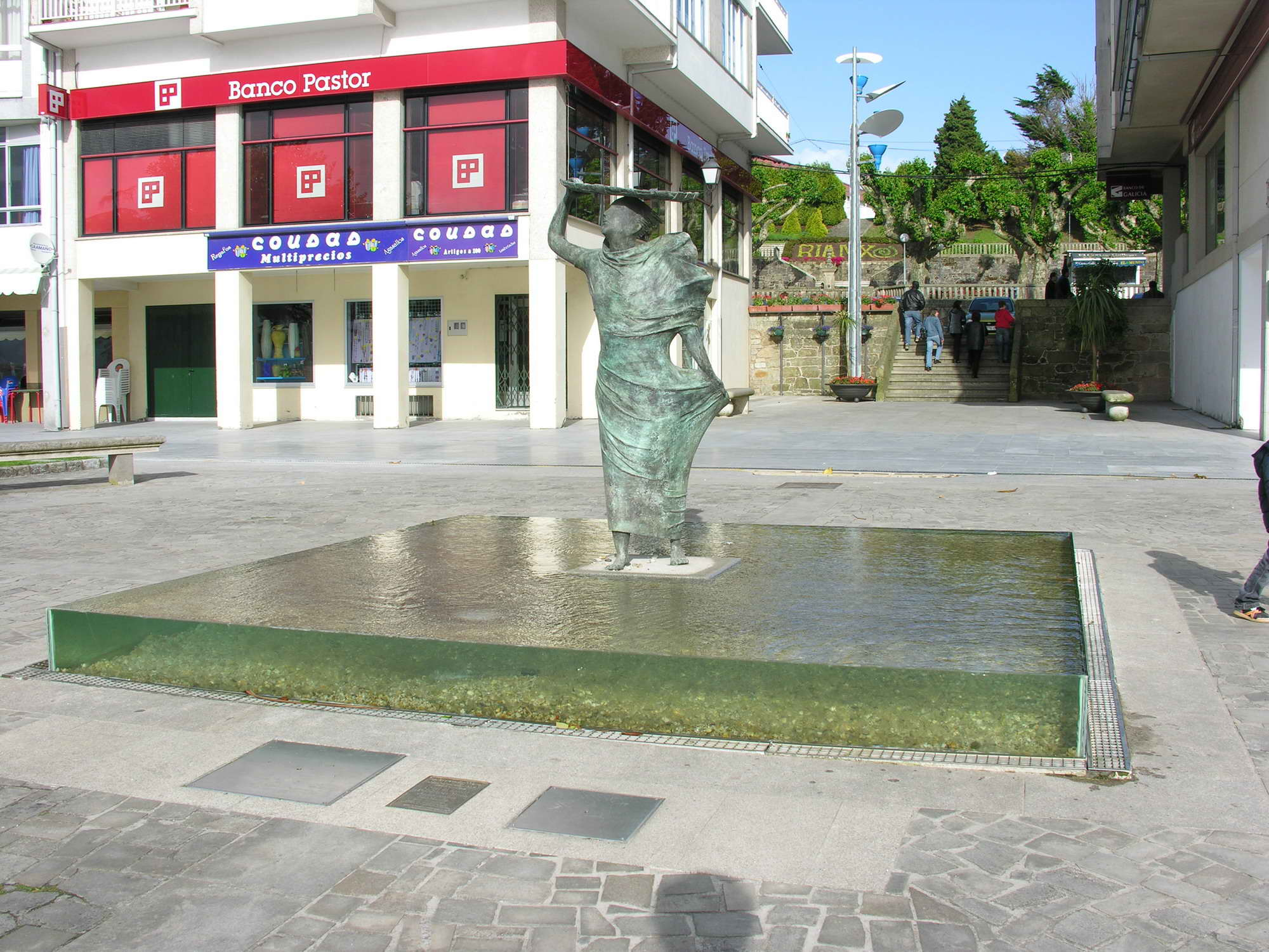 Rianxo. Galicia. España Publish by= Luis Miguel Bugallo Sánchez. Self made